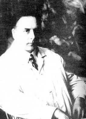 Jan Kojan (1886-1951), český akademický malíř a sochař